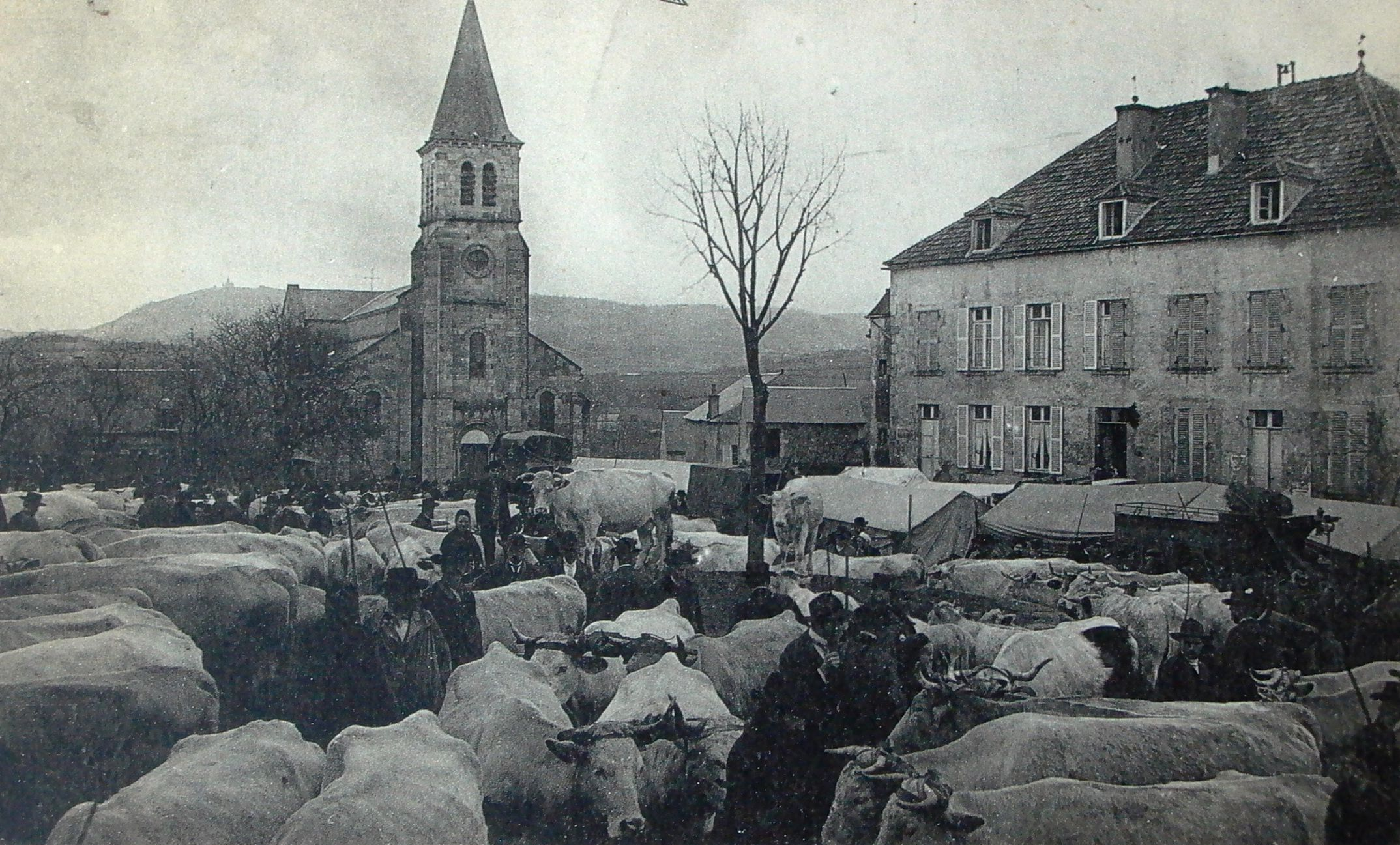 La place est transformée en champ de foire, au grand bonheur des cafés.